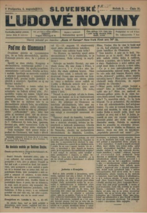 Slovenské ľudové noviny, týždenník vychádzajúci v Bratislave od 1910 do 1918.